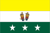 Escudo del Municipio Bolívar, Estado Trujillo, Venezuela